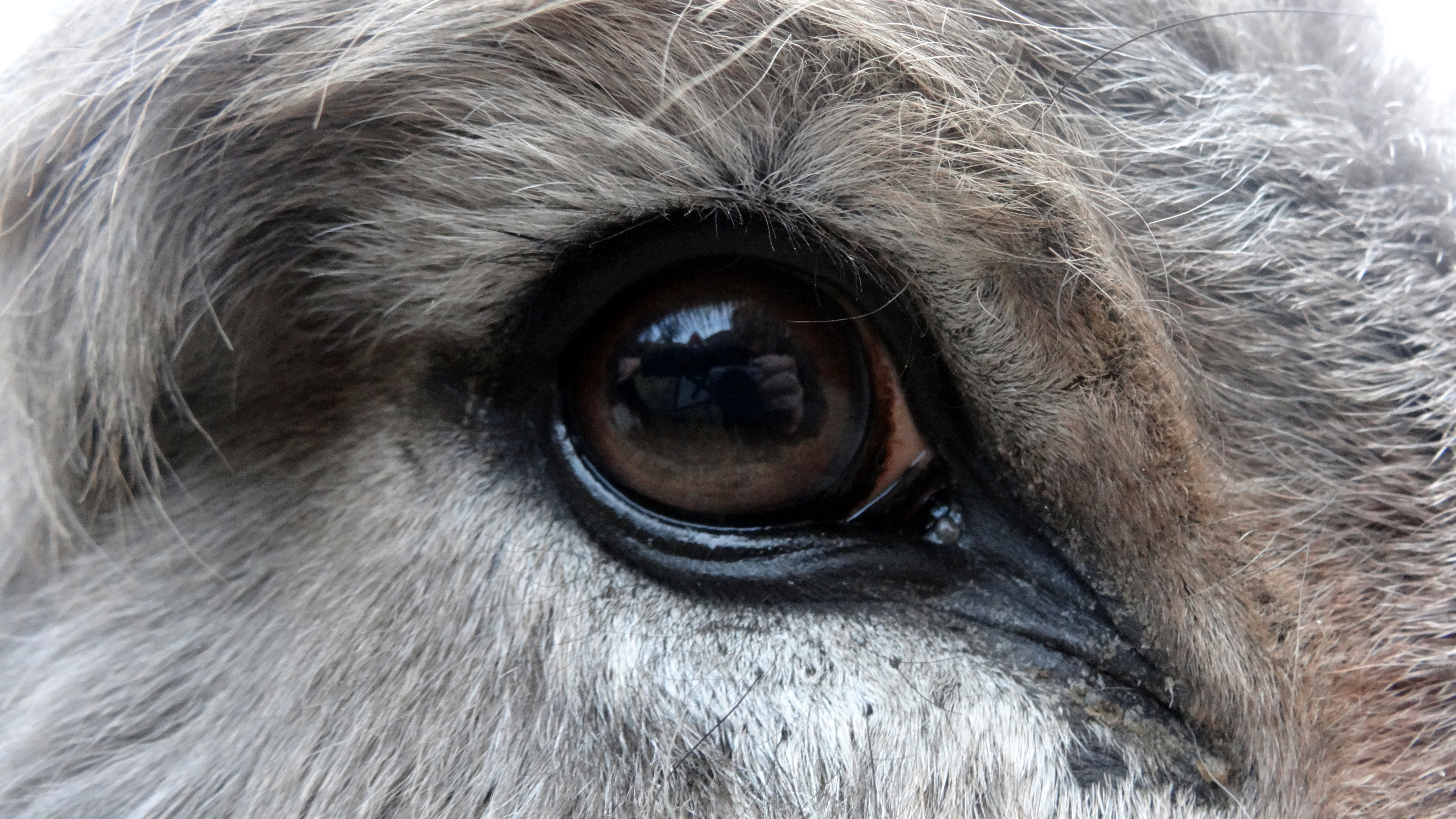 Vue d'un âne